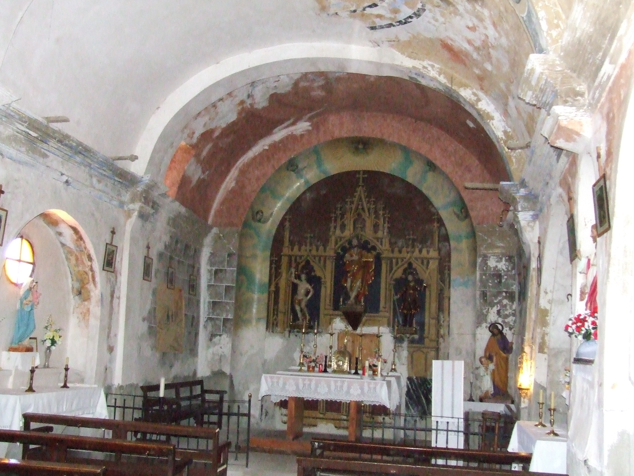 Interior de Sant Joan Baptista de Guiró (la Torre de Cabdella, Pallars Jussà)